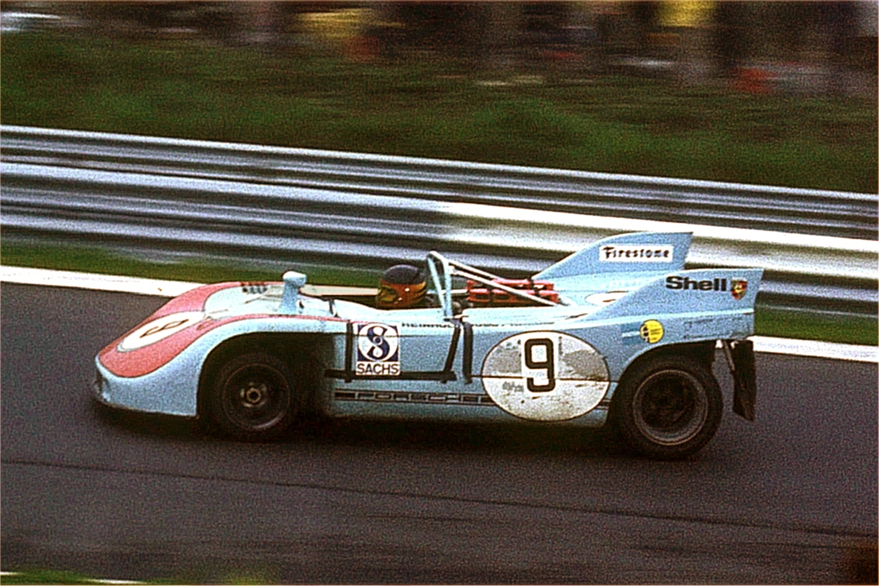 Reinhold Jöst im Porsche 908 beim 1000-km-Rennen auf dem Nürburgring